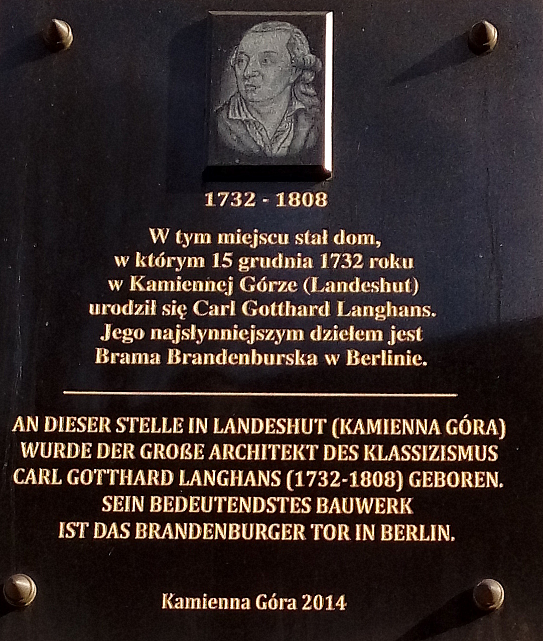 Kamienna Góra, tablica upamiętniająca Carla Gottharda Langhansa architekta m.in. Bramy Brandenburskiej w Berlinie na budynku Szkoły Podstawowej (Plac Kościelny 1)